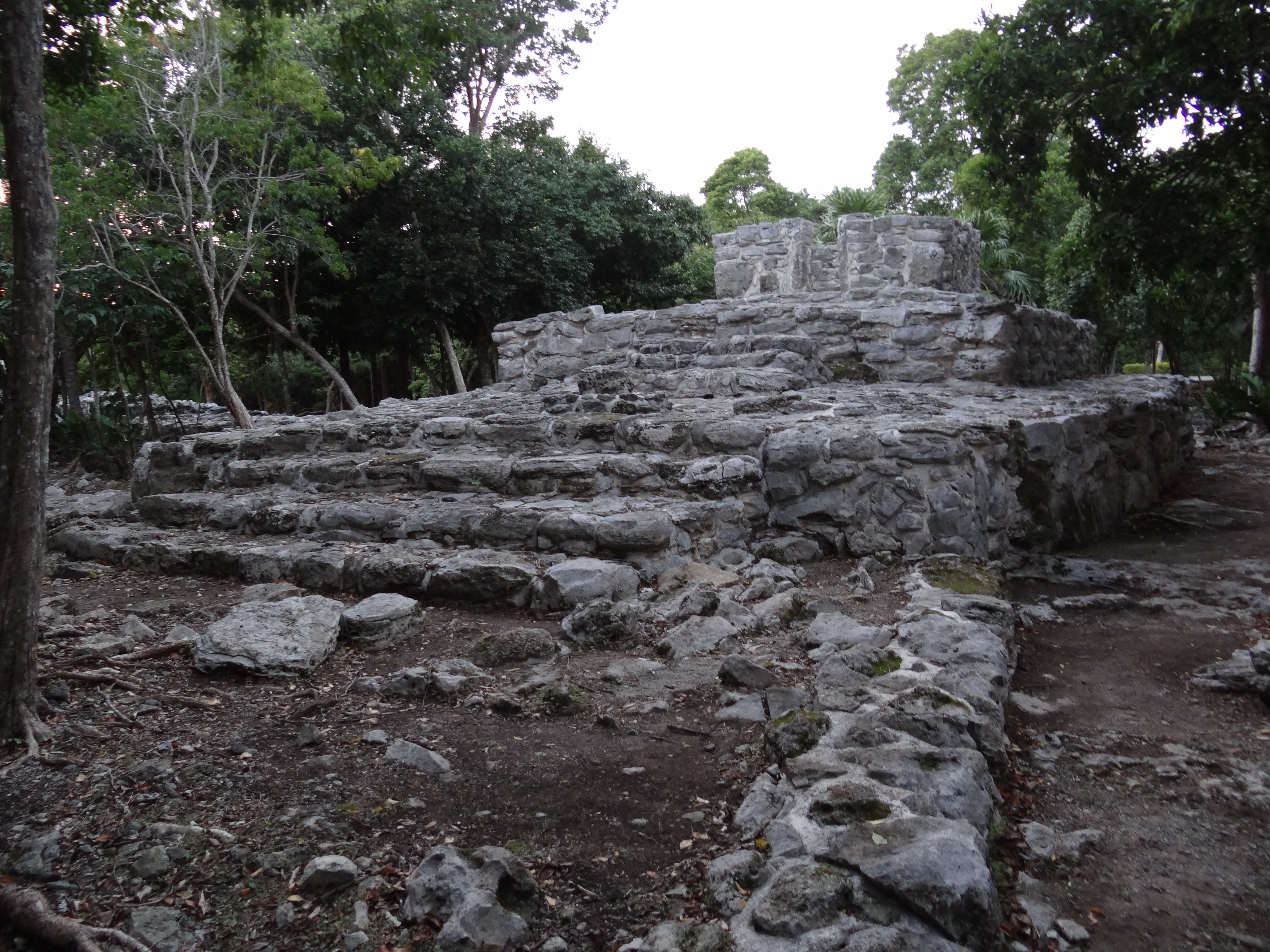 Xaman-Ha, or "waters of the north," is archaeology site in Playa del Carmen.It was a rest stop of sorts for Mayan travelers making their way from the great cities of the Mayan world to the island of Cozumel. שאמאן-הַא הם שמם של של שרידים ארכאולוגים הנמצאים על חוף הים הקריבי בחצי האי יוקטן. משמעות השם בשפת המאיה הוא מים של הצפון. במקום שוכנת היום העיר פְּלַאיה דֶל כַּרְמֶן. שריד מבנה בקבוצות E ו- F